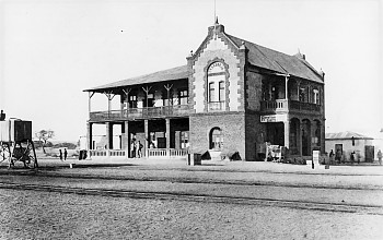 Okahanja Station in 1903